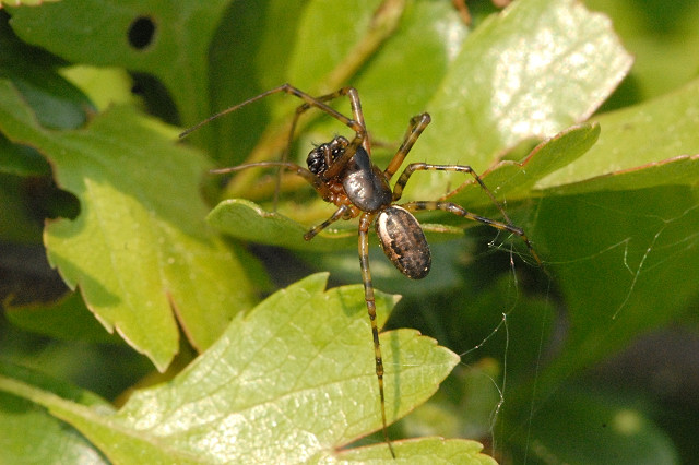 Neriene montana from Commanster, Belgian High Ardennes .